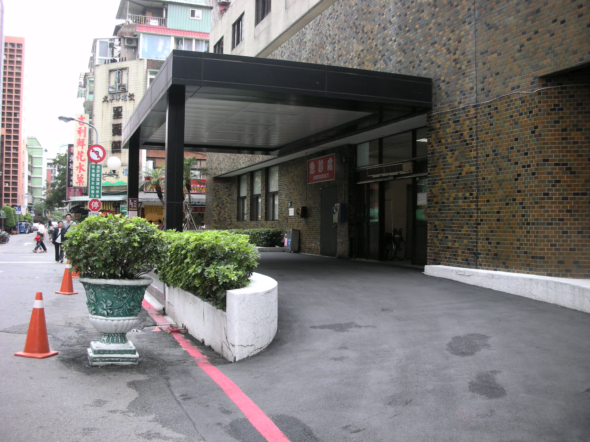 國泰綜合醫院總院本館急診處大門。